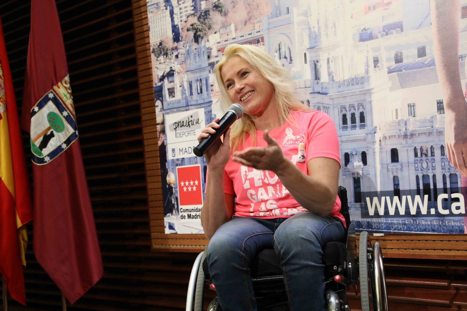 La delegada del Área de Políticas de Género y Diversidad, Celia Mayer, y el director de publicaciones de Motorpress, Fran Chico, han presentado hoy viernes 28 de abril, en el Palacio de Cibeles la decimocuarta edición de la Carrera de la Mujer que se celebrará el próximo 7 de mayo. Junto a todo ello, se entregaron los tradicionales premios a personas relevantes de apoyo a la mujer y al deporte: Carlota Serrano, subcampeona de España de 400 m vallas que ha derrotado el cáncer de mama en 2016; Gema Hassen-Bey, medallista paraolímpica en Barcelona 92 que está preparando su nuevo reto, Cumbre Bey – Kilimanjaro Challenge para llegar a ser la primera mujer en silla de ruedas que culmine la cima del Monte Kilimanjaro; y Emilio Monteagudo, jefe de Subinspección de Tráfico del Ayuntamiento de Madrid.